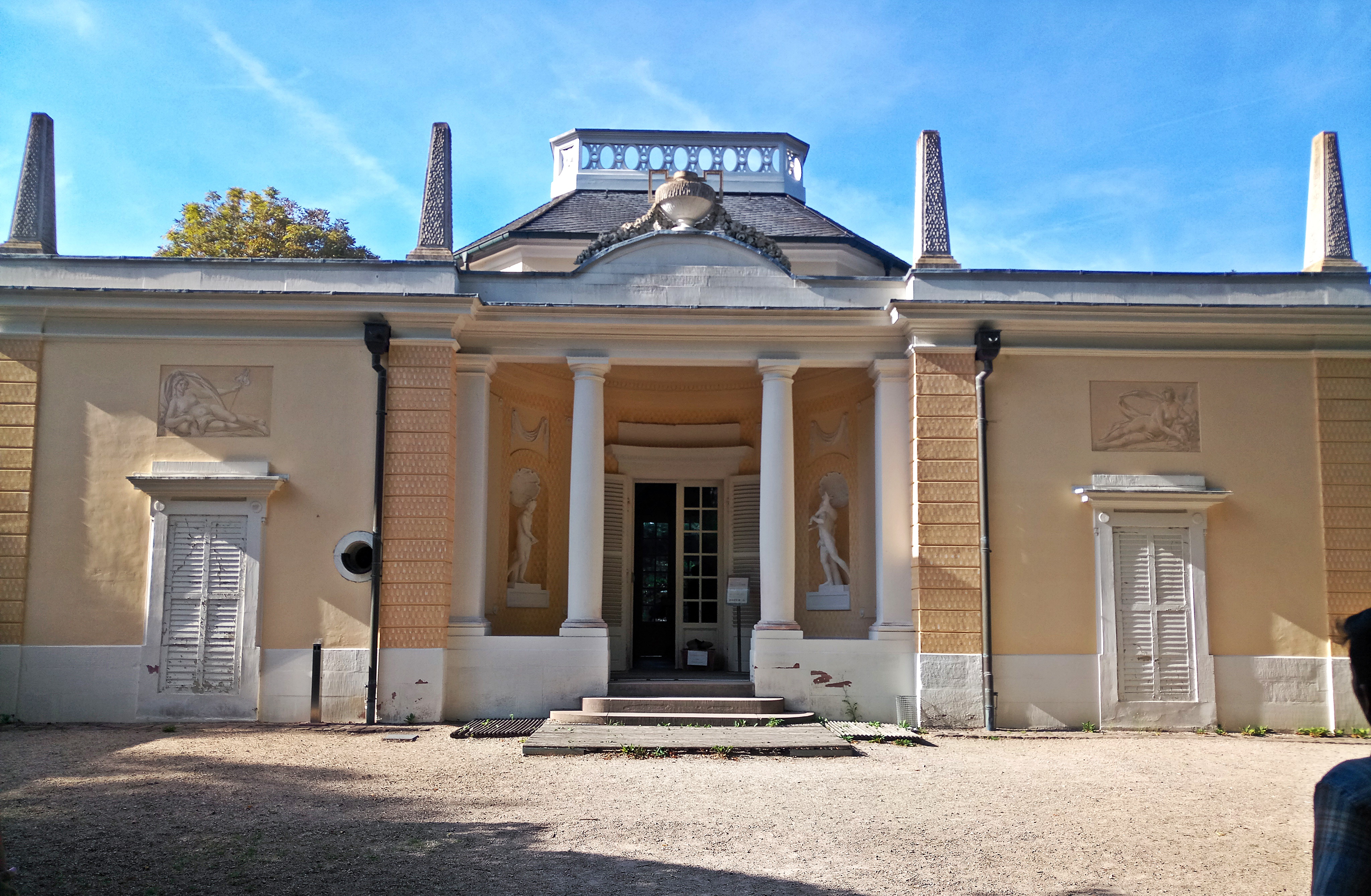 Badhaus Schwetzingen, Frontseite